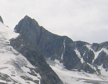 die Reichenspitze